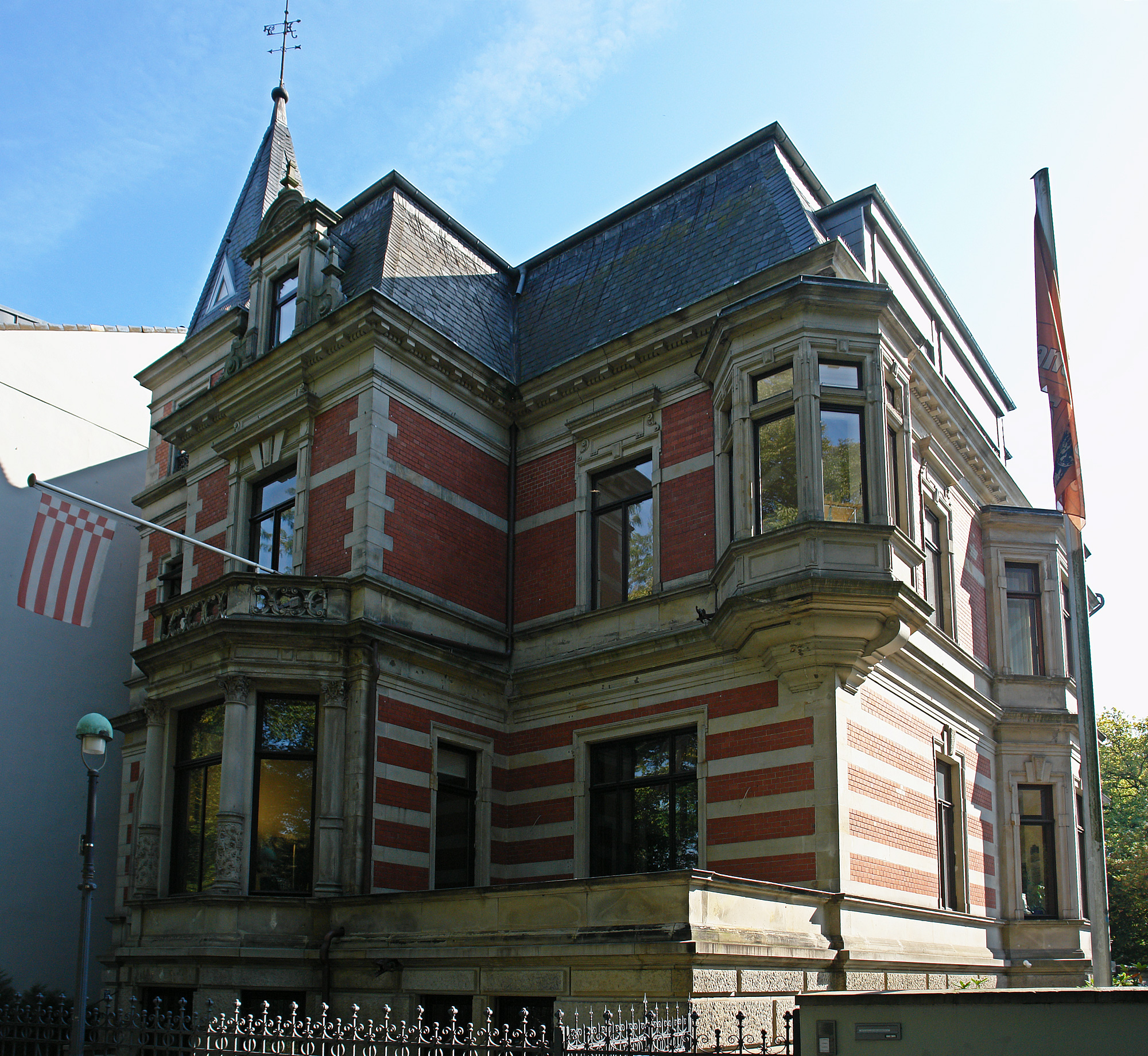 Villa Joh. Smidt in Bremen, Contrescarpe 32.Das abgebildete Objekt ist ein geschütztes Kulturdenkmal in der Freien Hansestadt Bremen, mit der Nr. 0285 beim Landesamt für Denkmalpflege registriert.